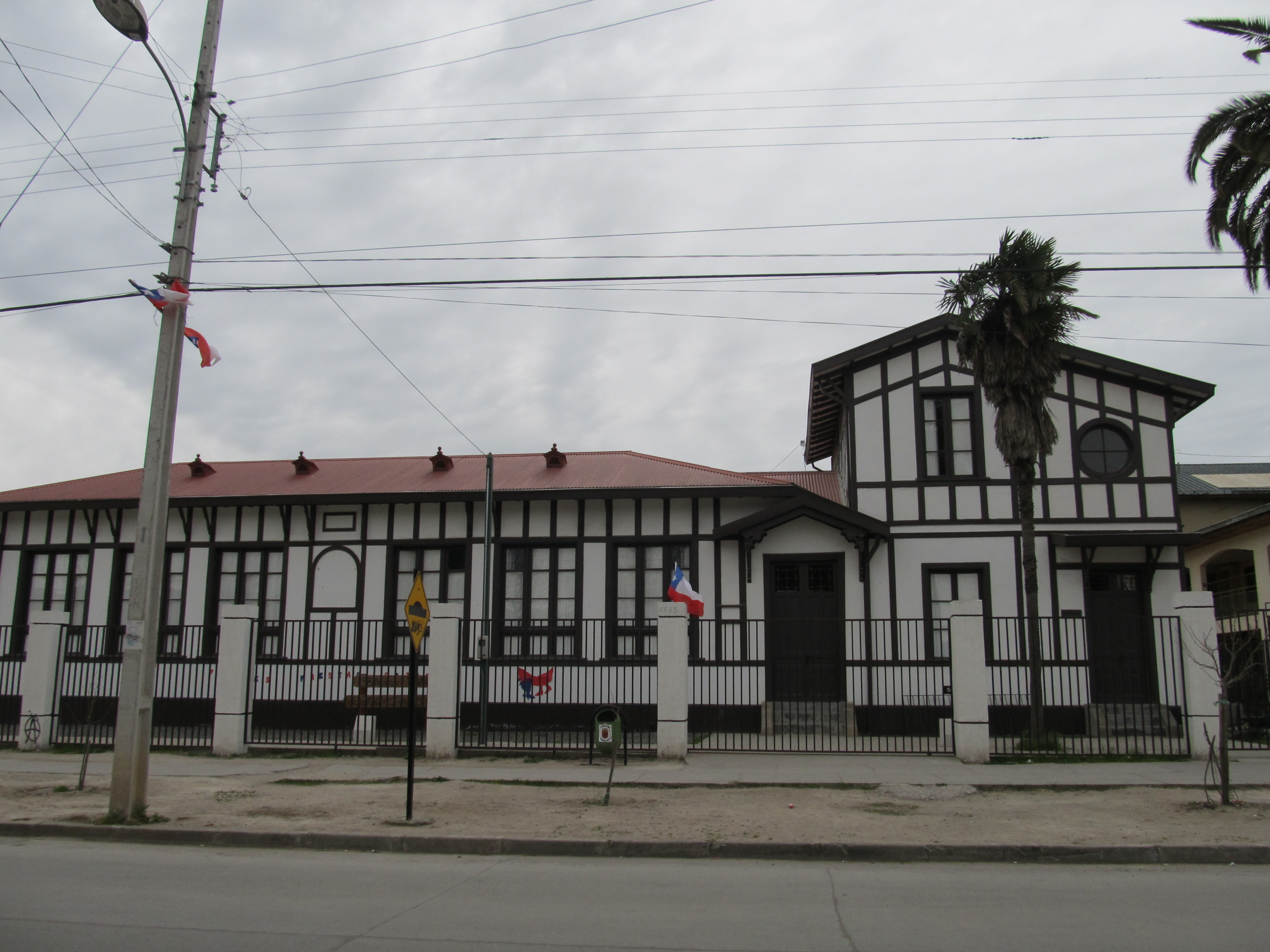 Escuela Básica de Peralillo This is a photo of a national monument in Chile: 1073